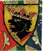 Der Mohr aus dem Wappen der Freisinger Fürstbischöfe.